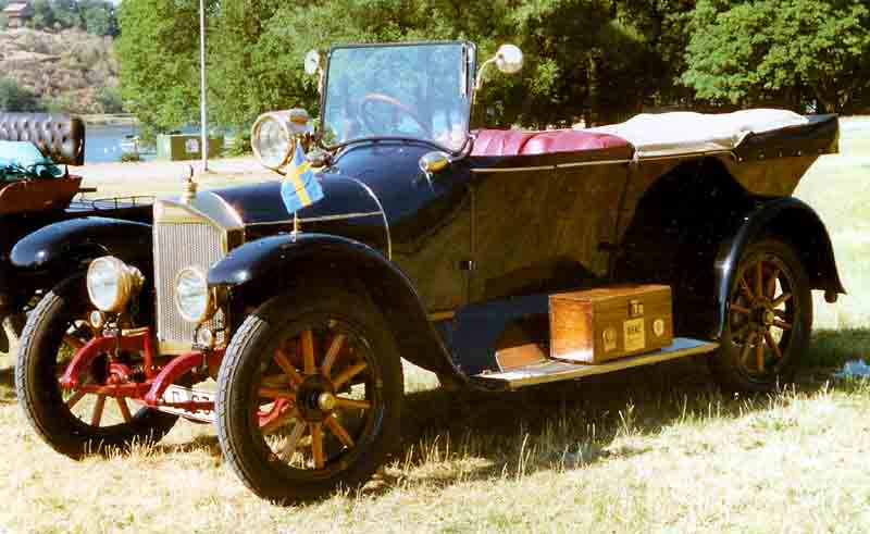 Benz 8/20 PS Doppelphaeton 1914